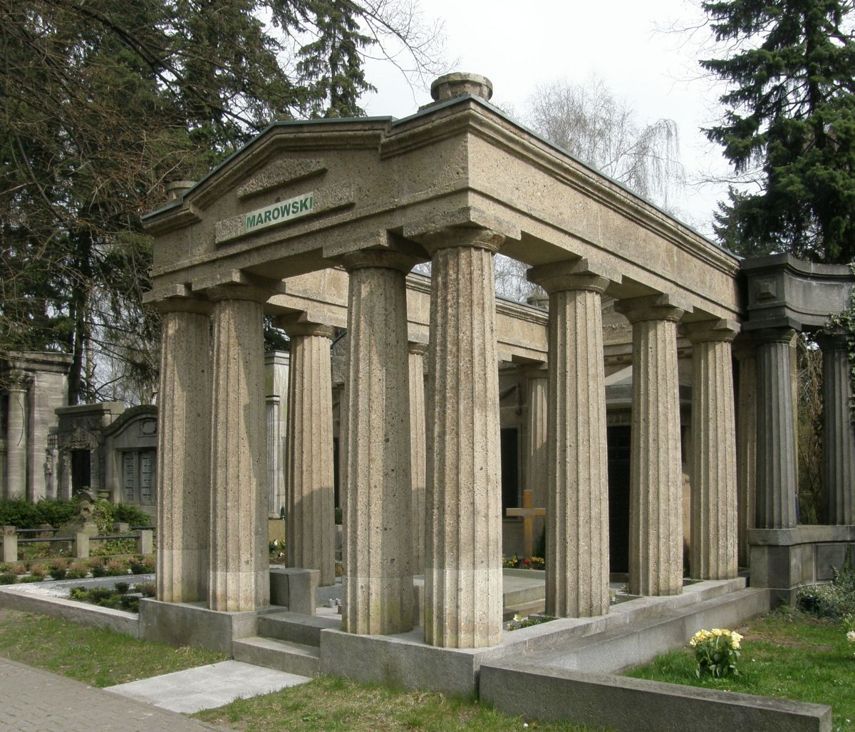 Friedhof Wilmersdorf in Berlin; Erbbegräbnisstätte von Dincklage, nach Entwurf von Hans Dammann